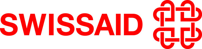 Das ist das neue Logo von SWISSAID.